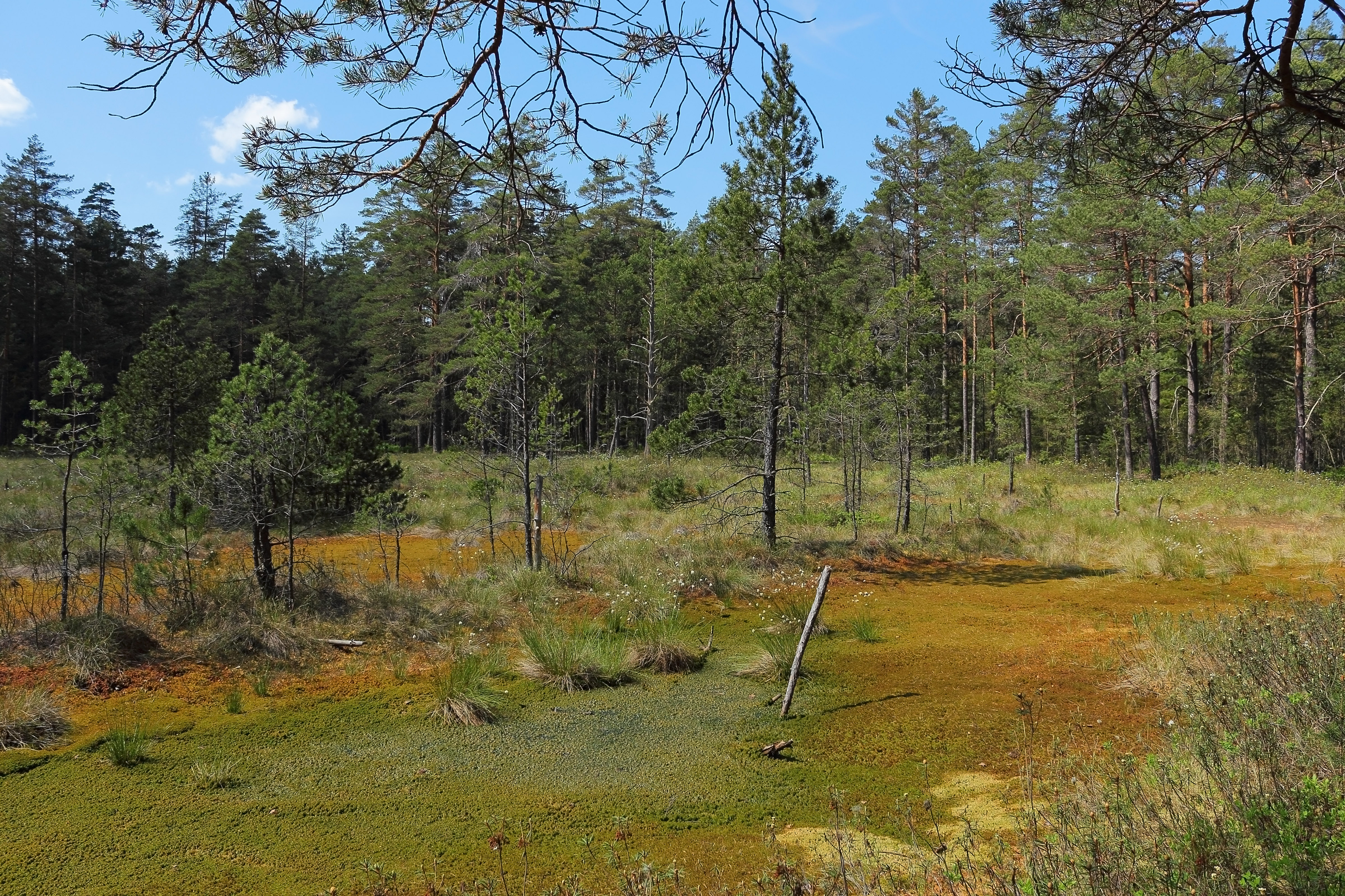 Das Rottalmoos liegt südwestlich von Litschau auf rund 542 Meter Seehöhe und erstreckt sich über eine Fläche von 10,86 Hektar. In dem seit 1999 zum Naturschutzgebiet erklärten Hochmoor wachsen viele gefährdete Pflanzen, etwa der Sumpfporst. This media shows the nature reserve in Lower Austria with the ID 46.